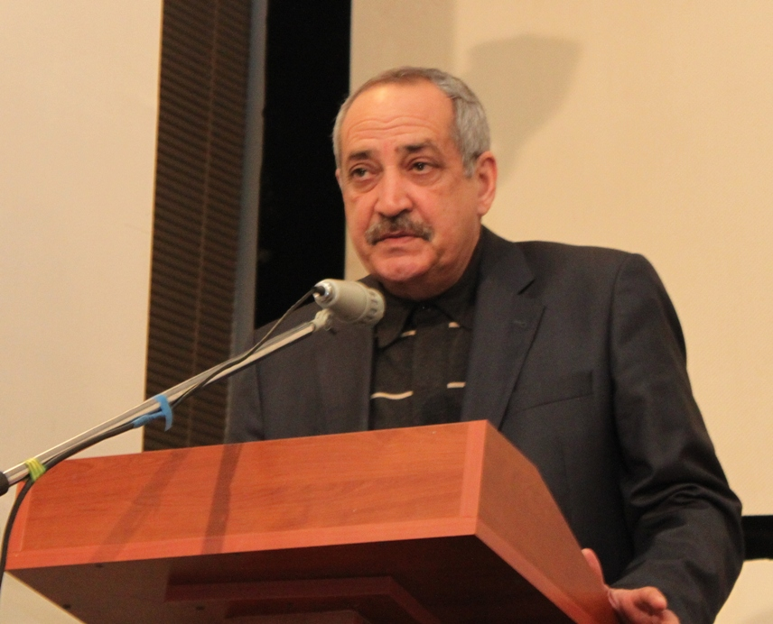 Расим Балаев, азербайджанский актёр.